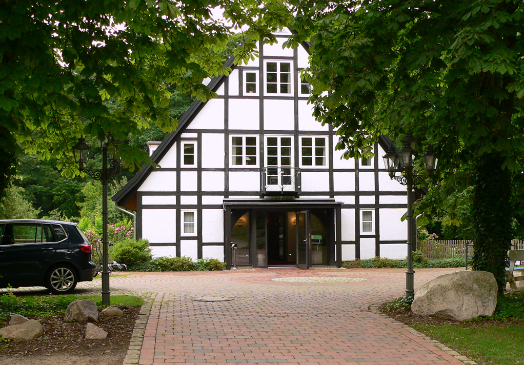 Kloster Heiligenberg, neu erbautes Gästehaus des Hotels, vor dem Bau erfolgte auf dem Areal 2011 eine Ausgrabung